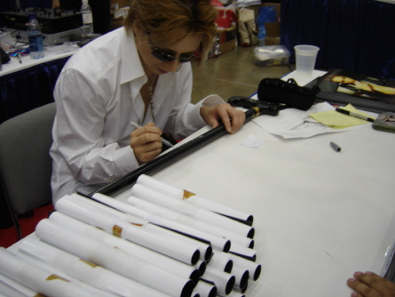 X Japan drummer Yoshiki with fans at Otakon.